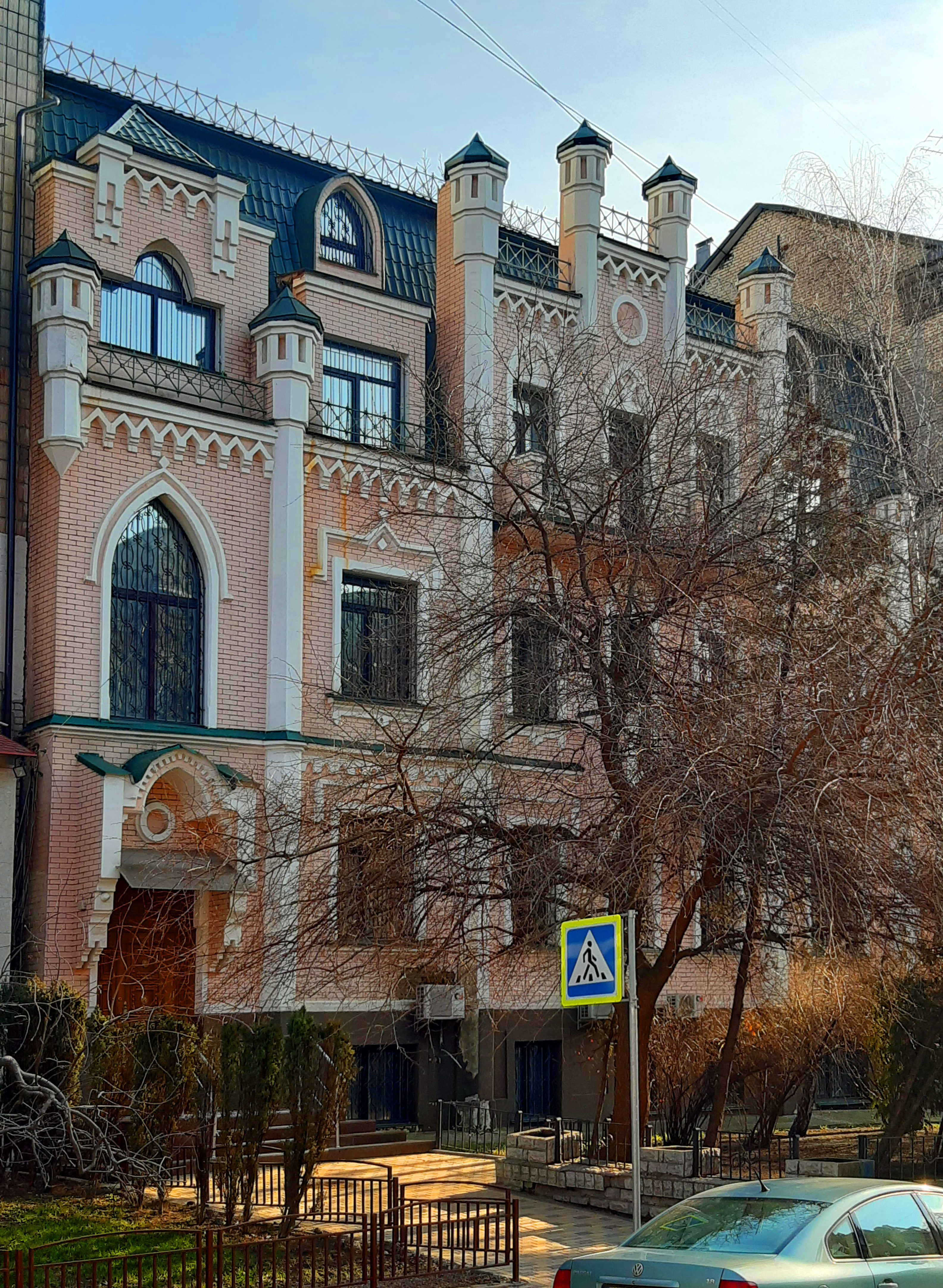 Прибутковий будинок, Київ, вул. Микільсько-Ботанічна, 3